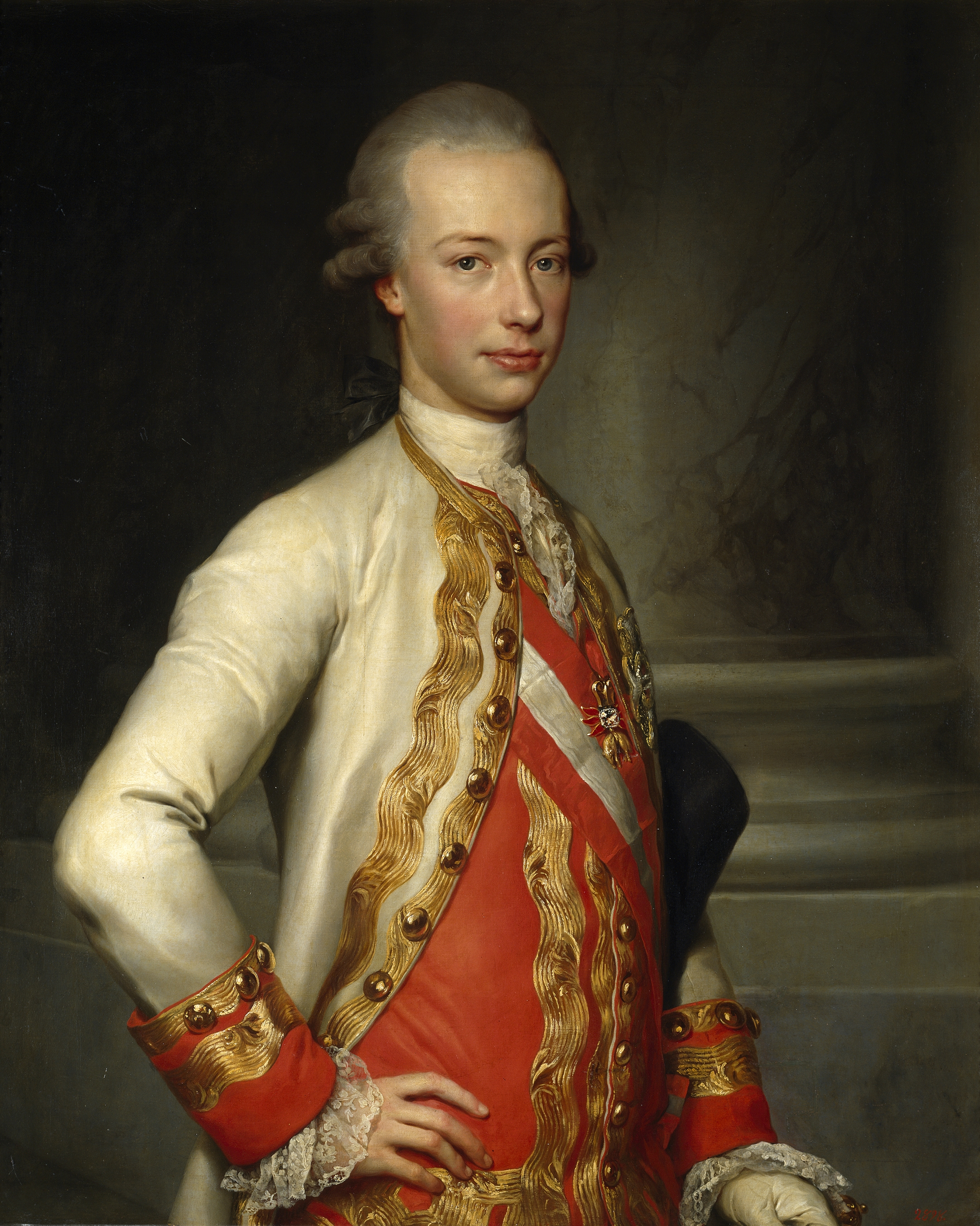 Retrato del archiduque Leopoldo de Lorena (1747-1792), que llegó a ser gran duque de Toscana y posteriormente emperador del Sacro Imperio Romano Germánico.